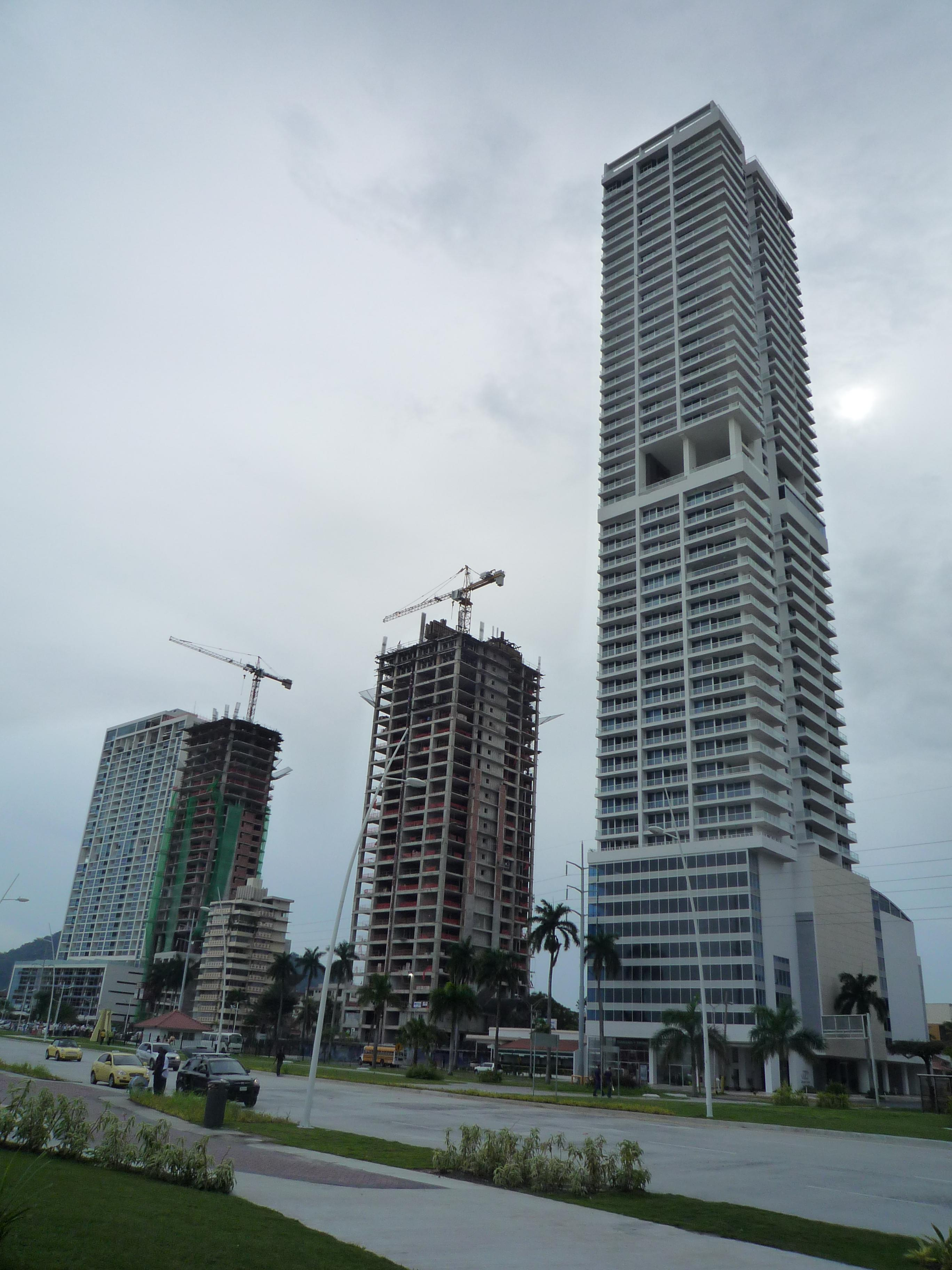 Construcción en la Ciudad de Panamá.